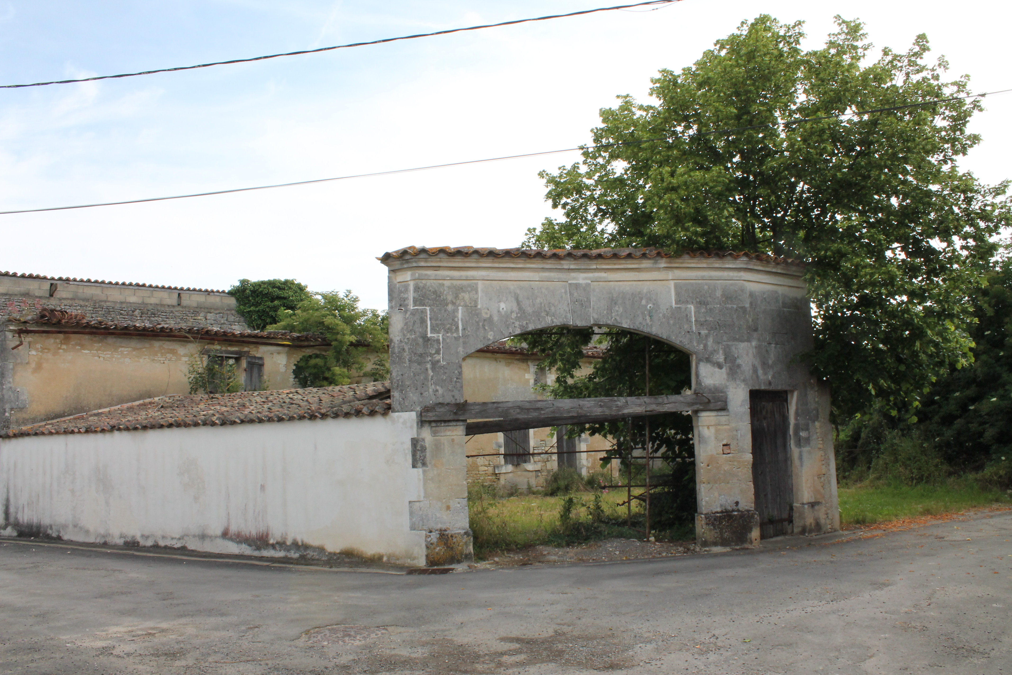 vieux chai des hauts de Champagnère